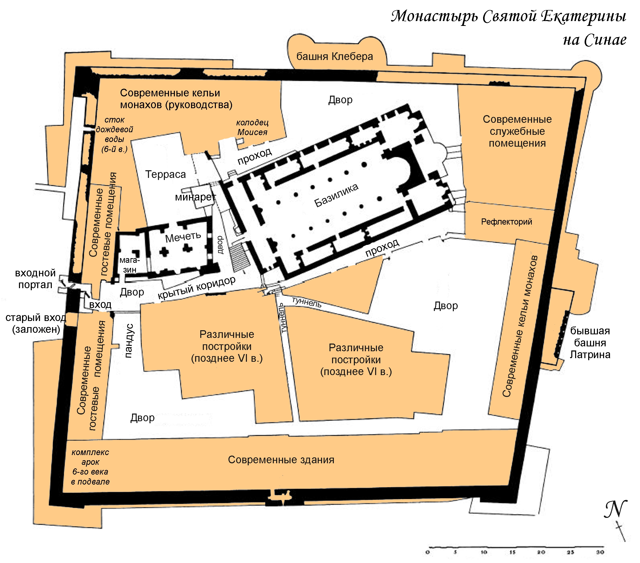 категория:Книги в монастыре Св.Екатерины